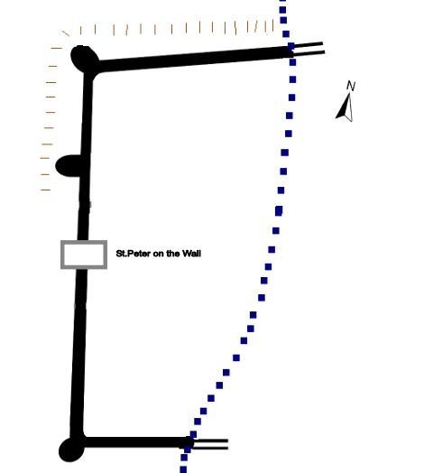 Skizze Kastell Othona (GB), nach B. Cunliffe 1977